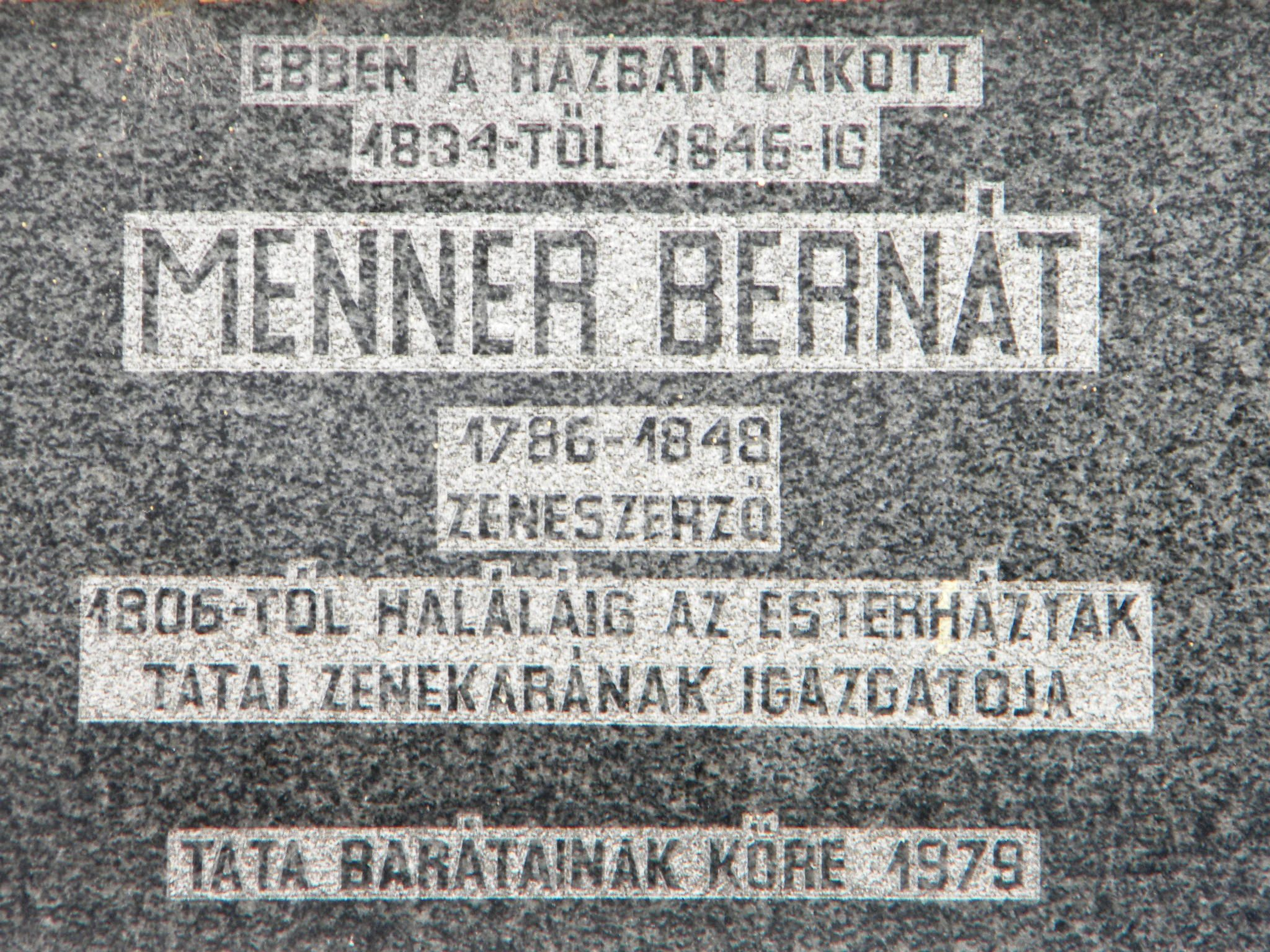 Emléktábla Menner Bernát zeneszerző szülőházán.